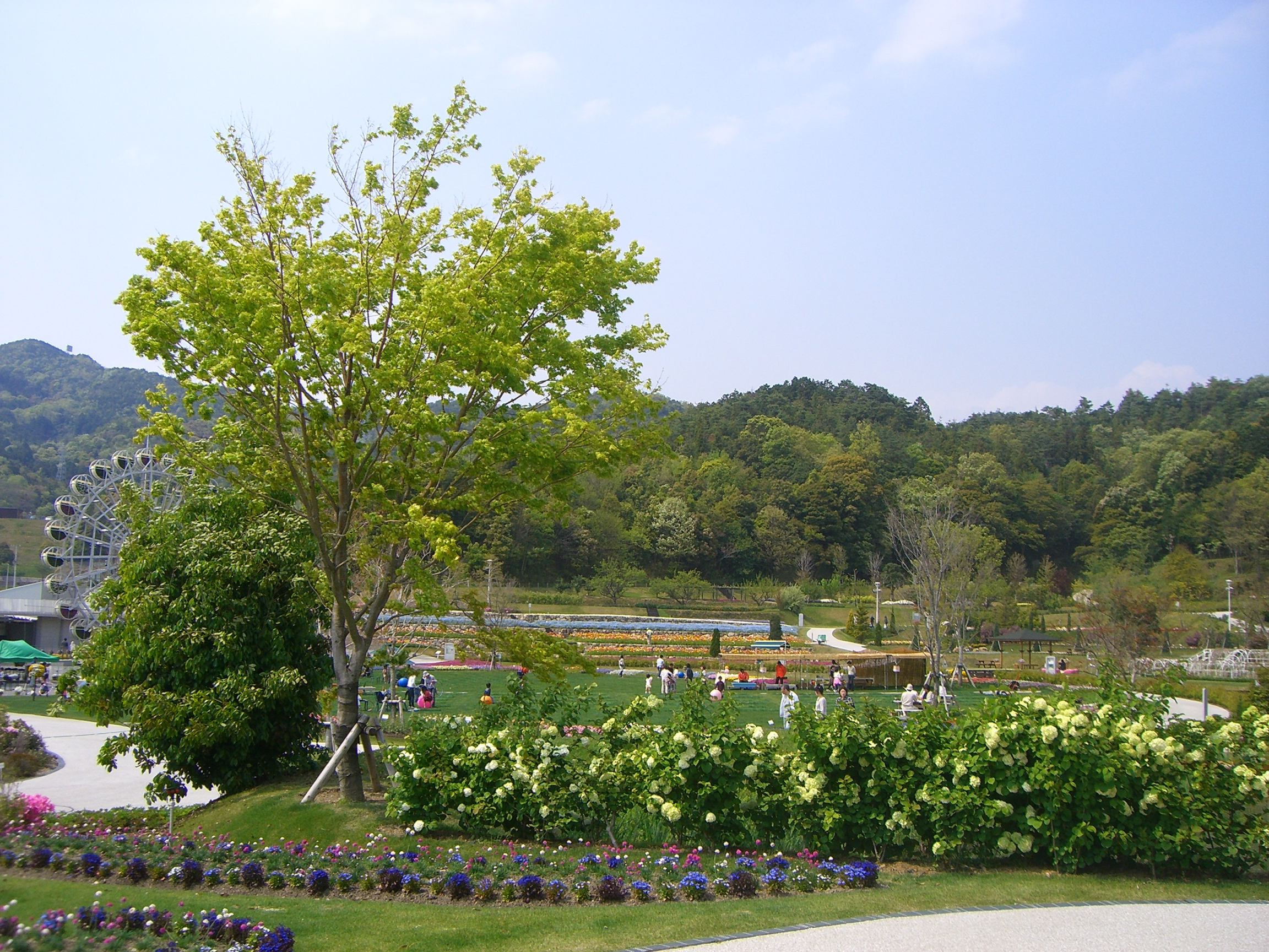 山口フラワーランドの園内の様子